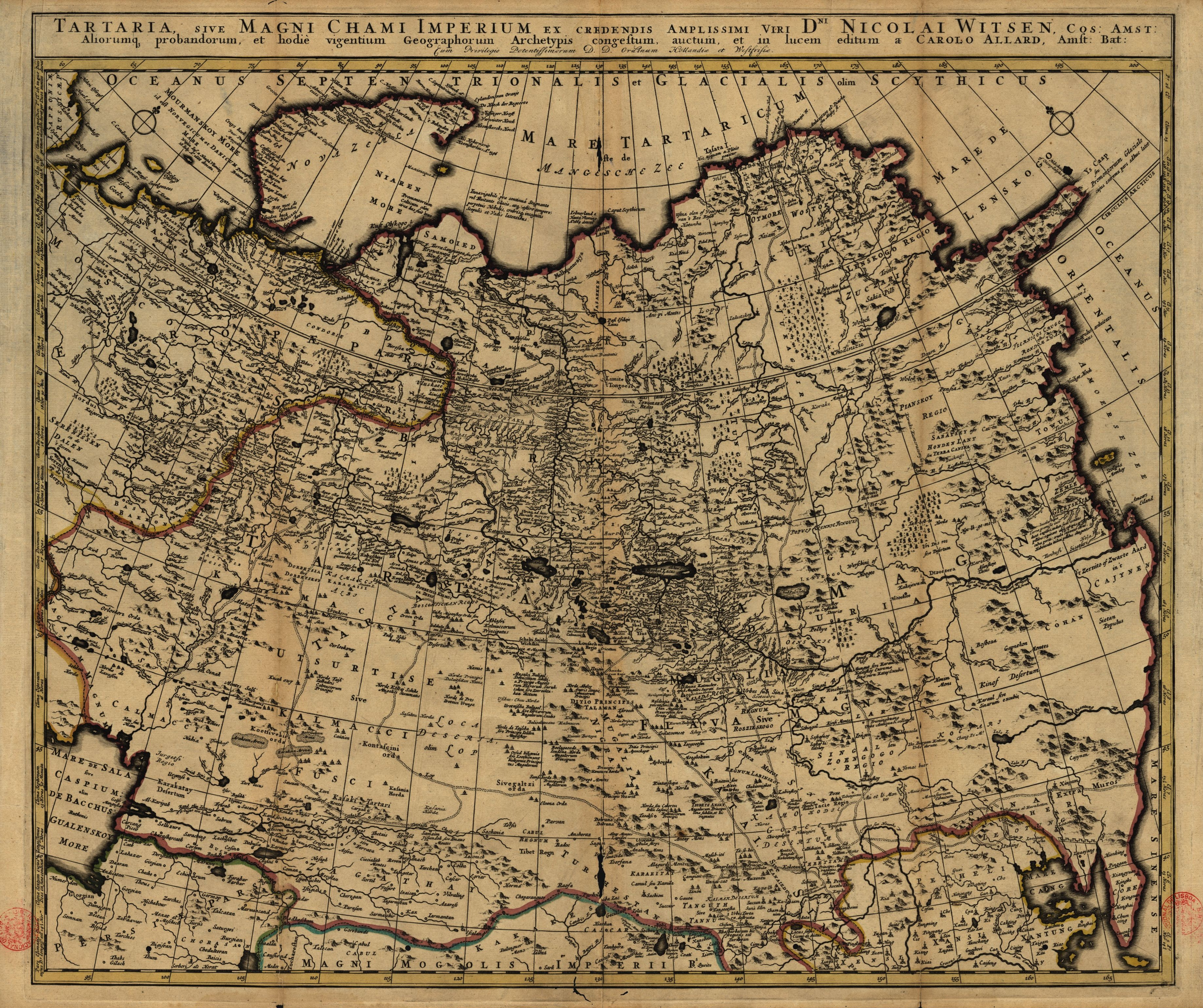 Tartaria, sive magni Chami Imperium ex credendis amplissimi viri, Amsterdam 1705 60 x 51 cm Publisher: Carolo Allard